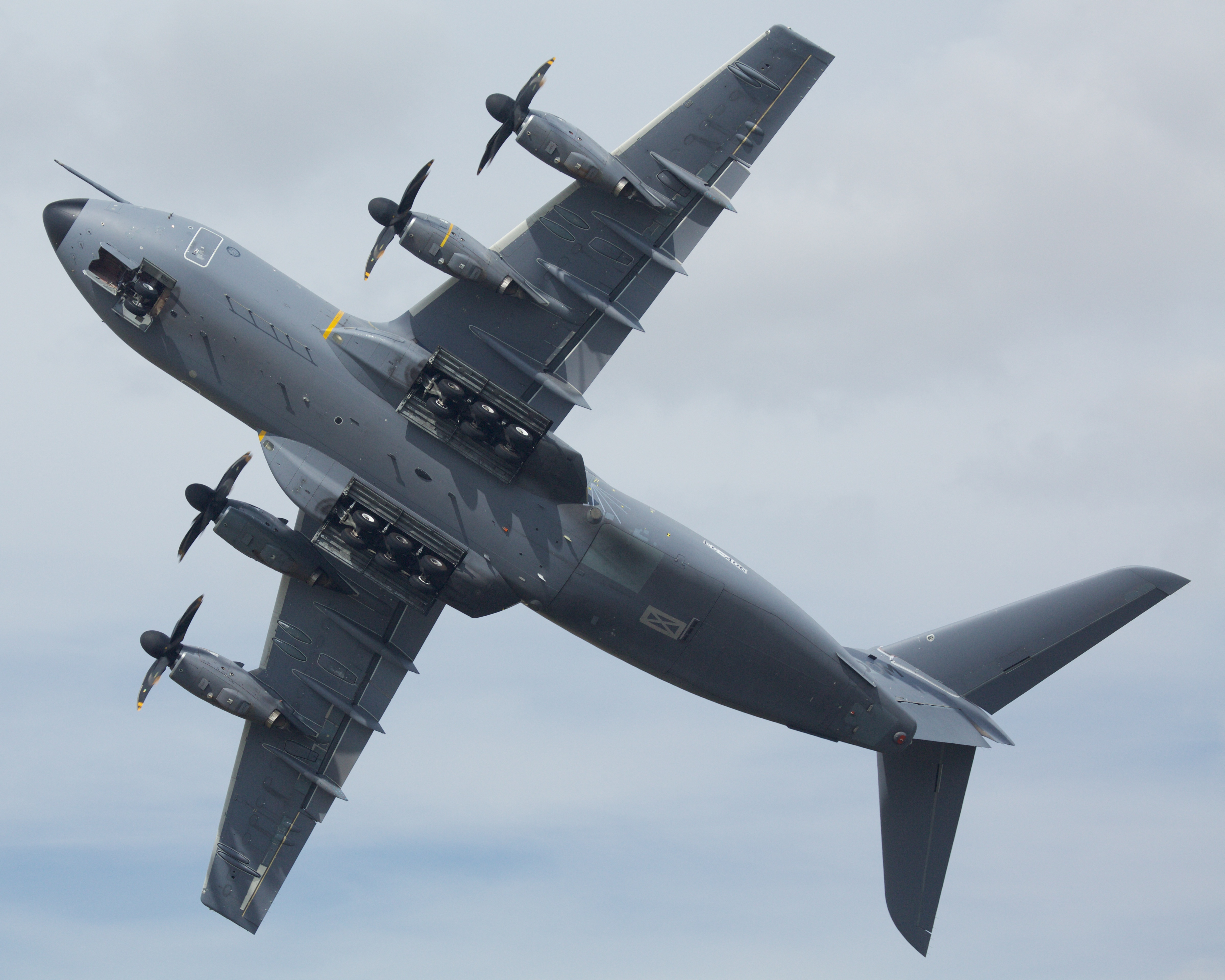 Airbus A-400M Atlas